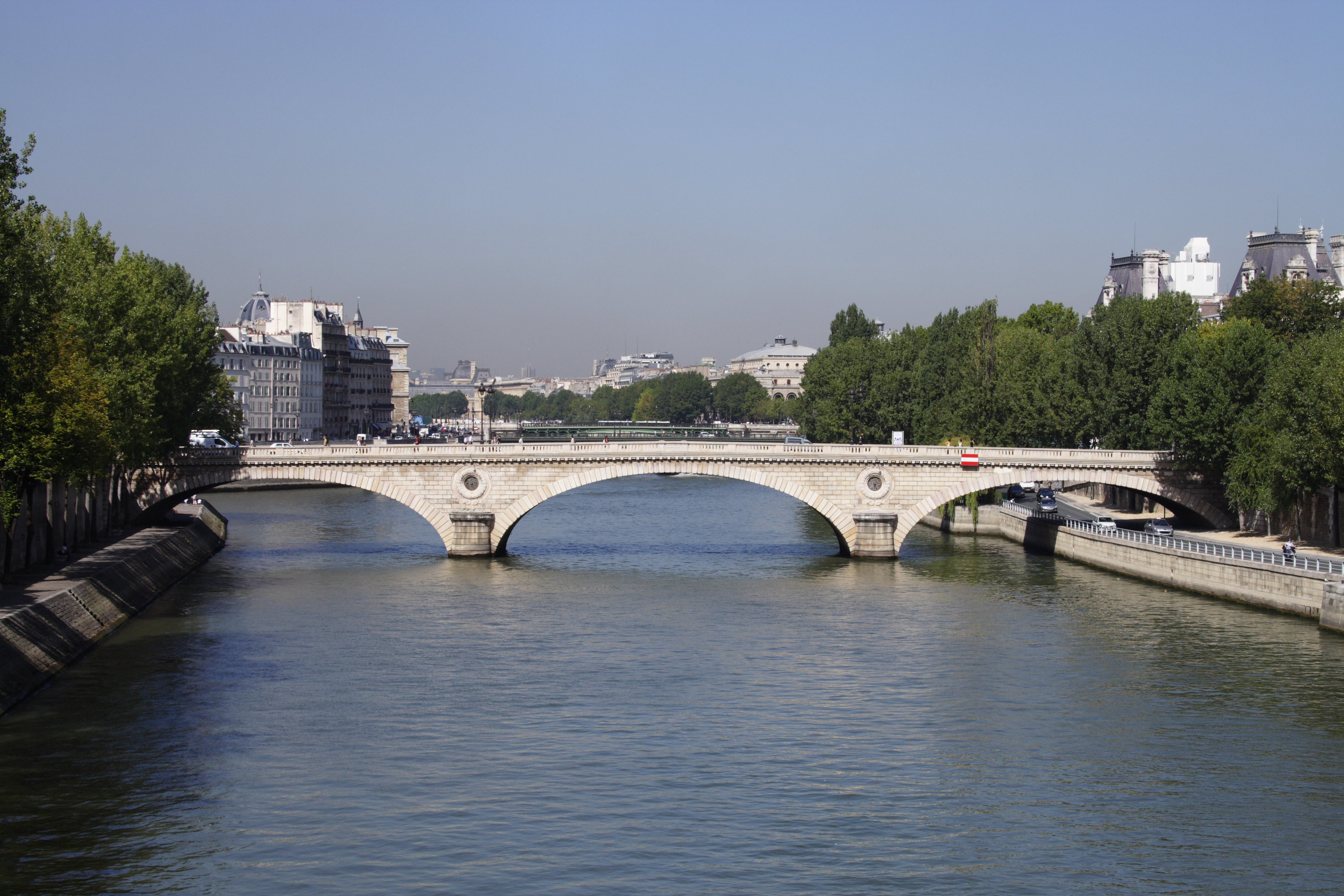 Pont Louis-Philippe(Paris, France)